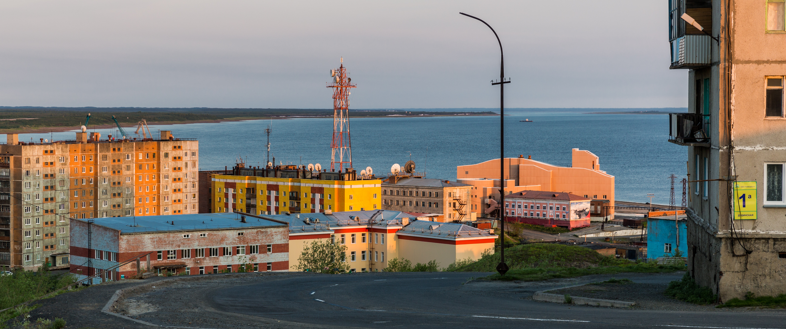 Dudinka at midnight, Taymyr Peninsula, Russia